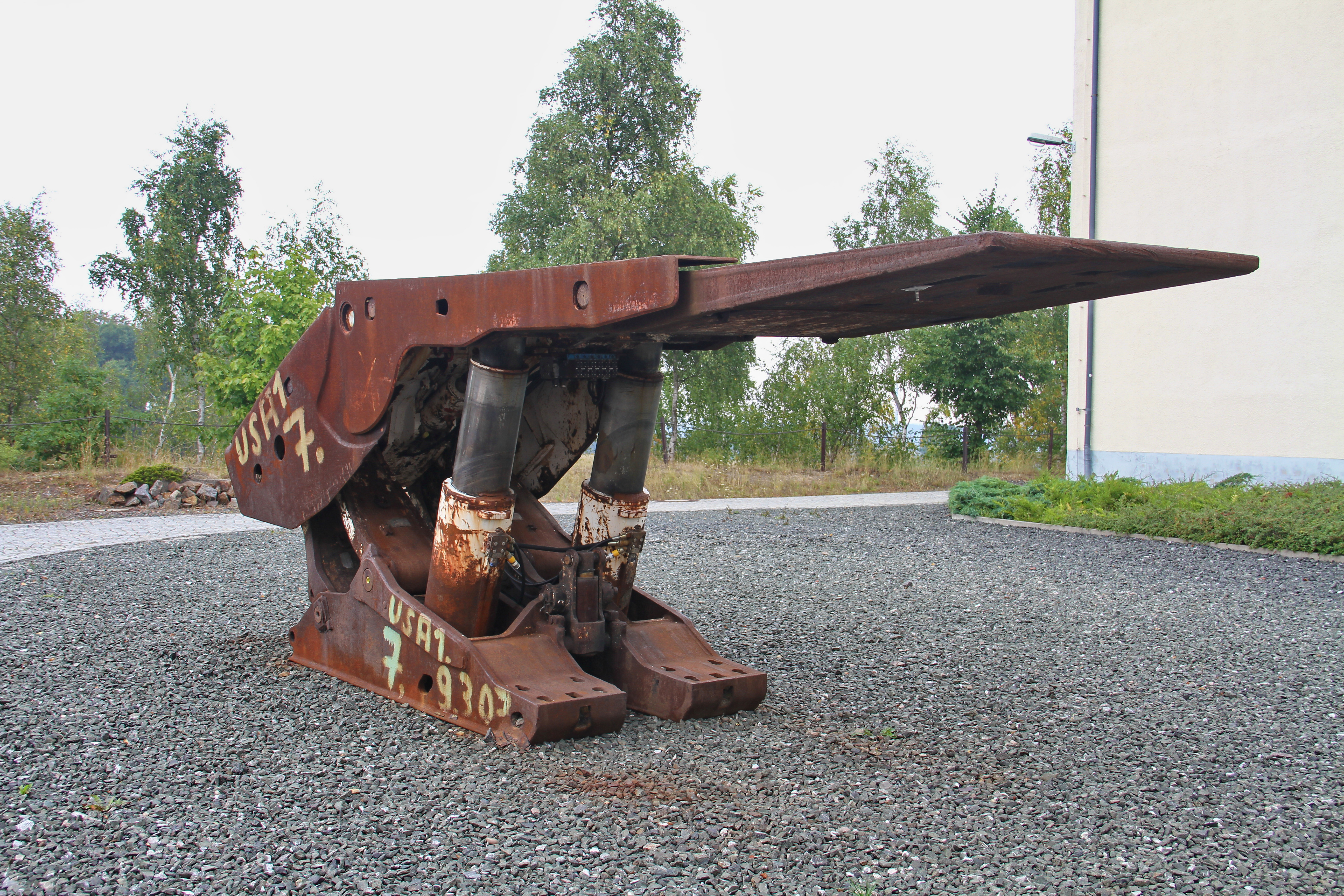 Außengelände der Reichen Zeche in Freiberg